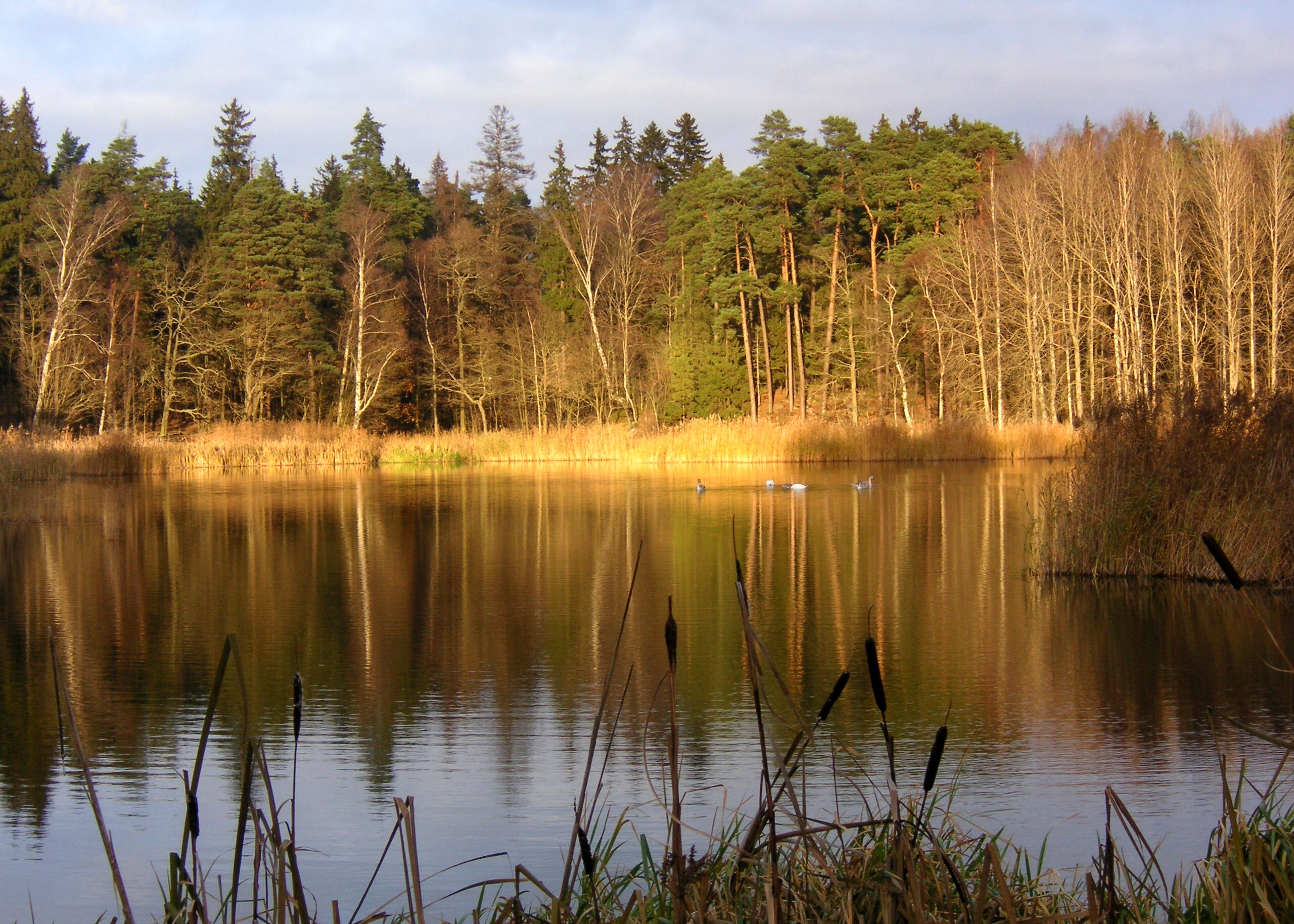 Lappkärret på Norra Djurgården i Stockholm